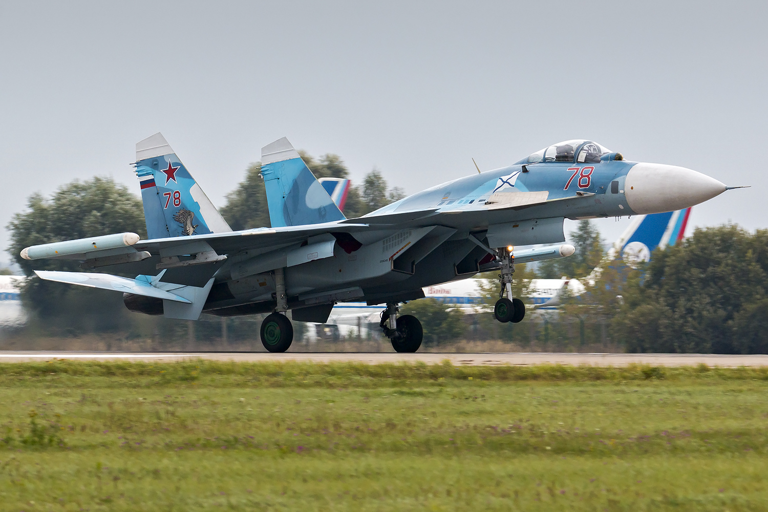 Sukhoi Su-33 78RED